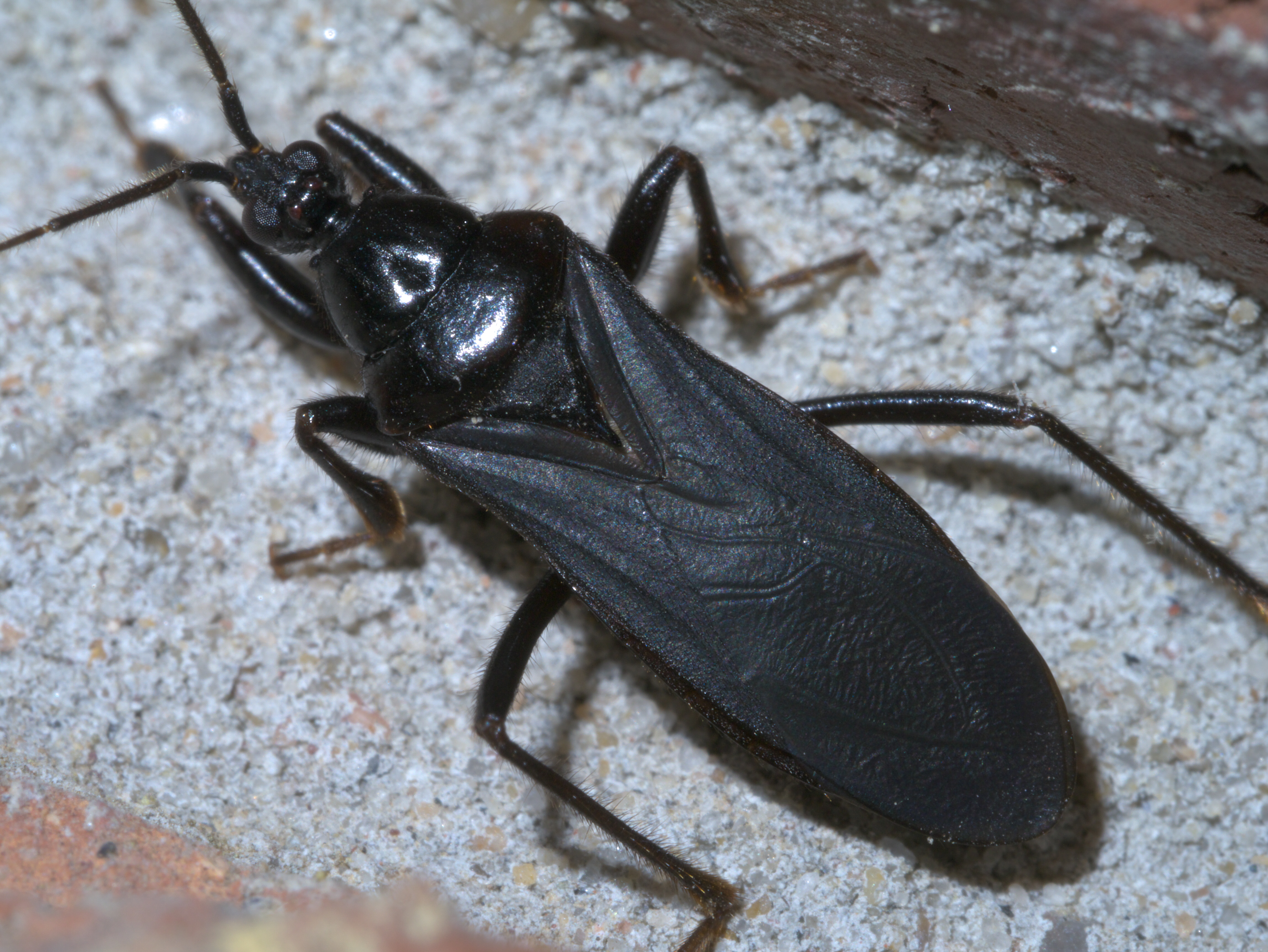 Melanolestes picipes, Black Corsair, ID Confidence: 80